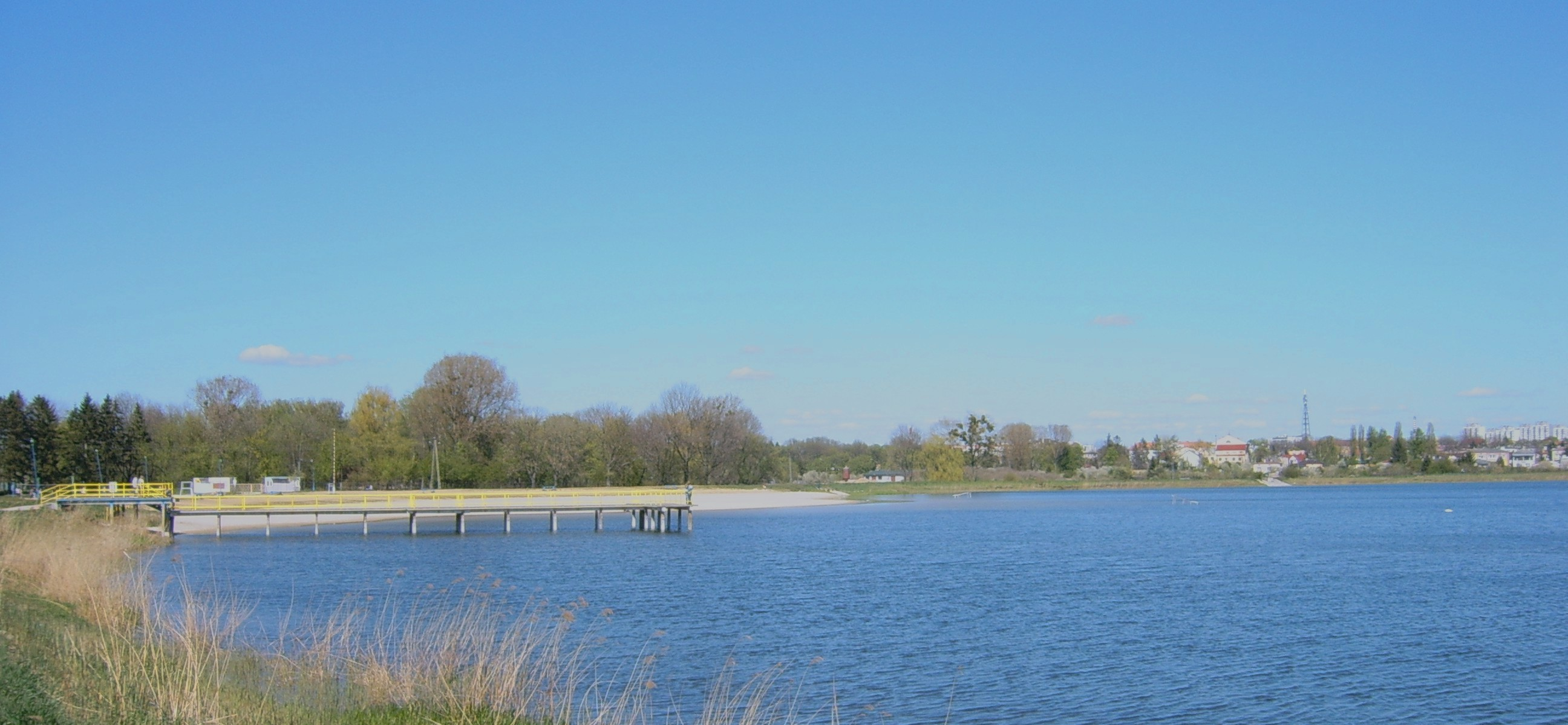 Zalew w Zamościu; część północna